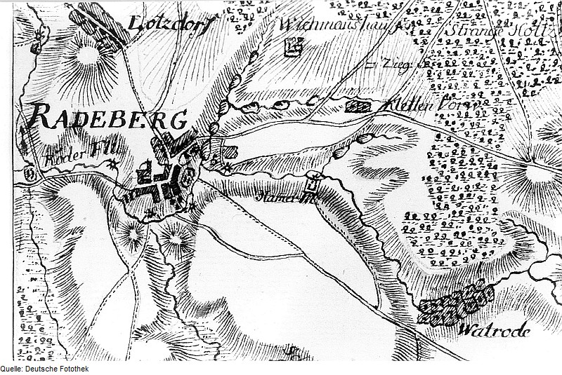 Original image description from the Deutsche Fotothek Radeberg. Ausschnitt aus: Karte von einem Teil des Kurfürstentums Sachsen, Petri, nach 1759 (Sign.: VII 63)